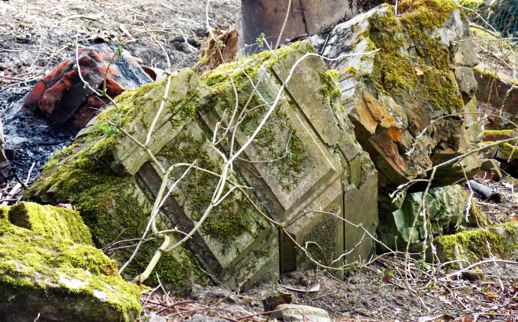 Schloss Wiebendorf Fassadenreste